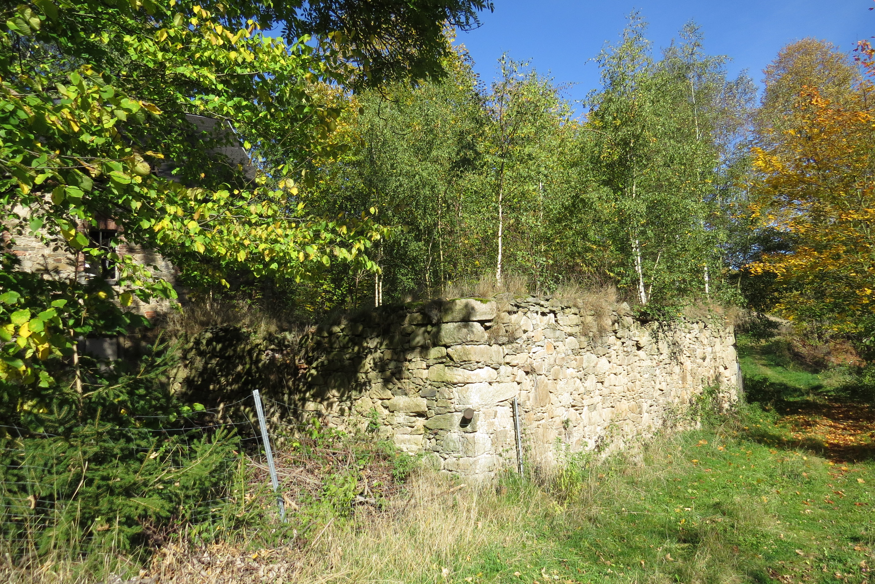 Zschorlauer Str., Gebäudereste auf der Fläche der eh. Tauschermühle, Aue